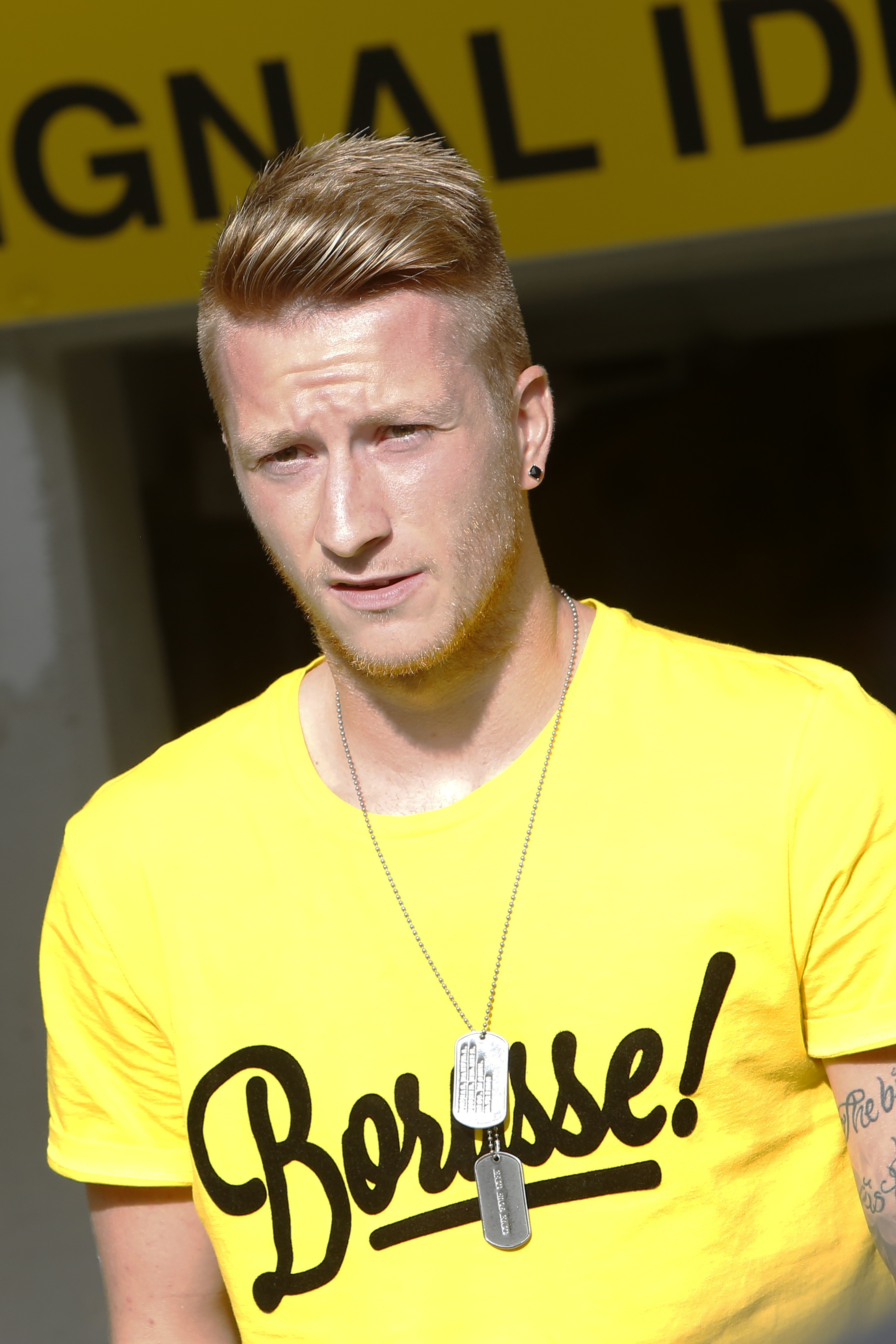 Marco Reus bei der Saisoneröffnung 2014 in Dortmund.